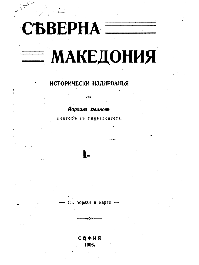 Северна Македония